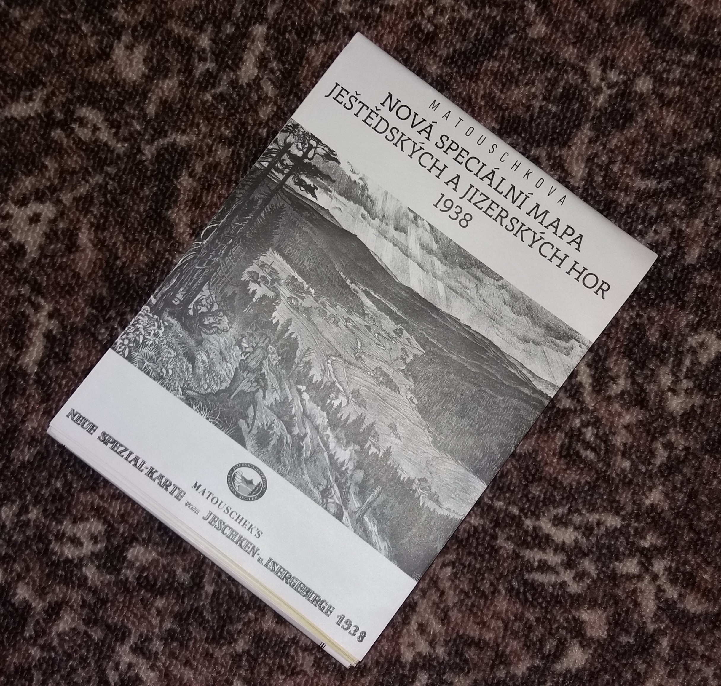 Obal reprintu Matouschkovy mapy Ještědských a Jizerských hor.